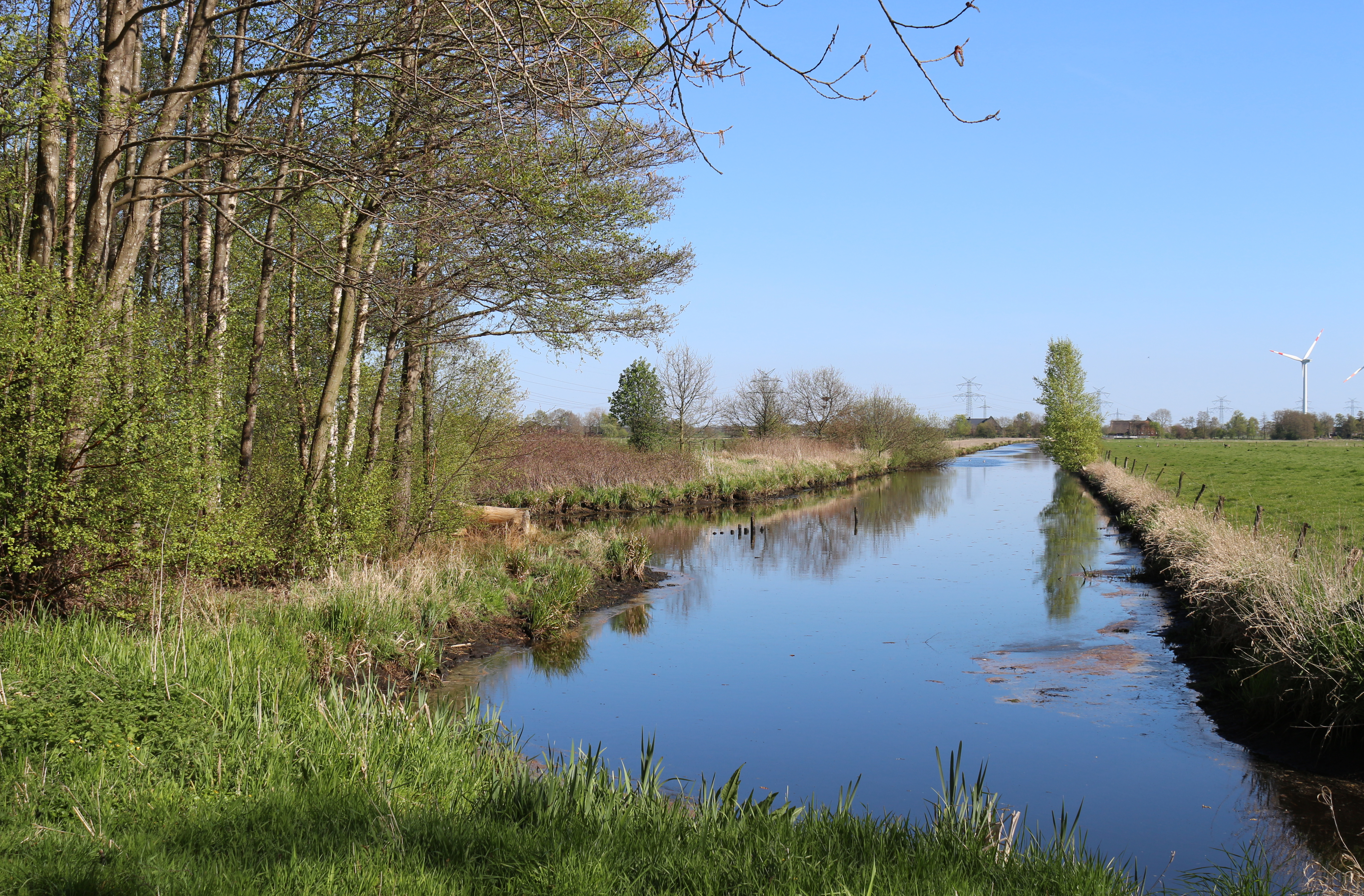 Hauptkanal im Landschaftsschutzgebiet von Altenmoor, Landkreis Steinburg, Schleswig-Holstein. Diese Aufnahme wurde vom Weg namens Landscheide aufgenommen.